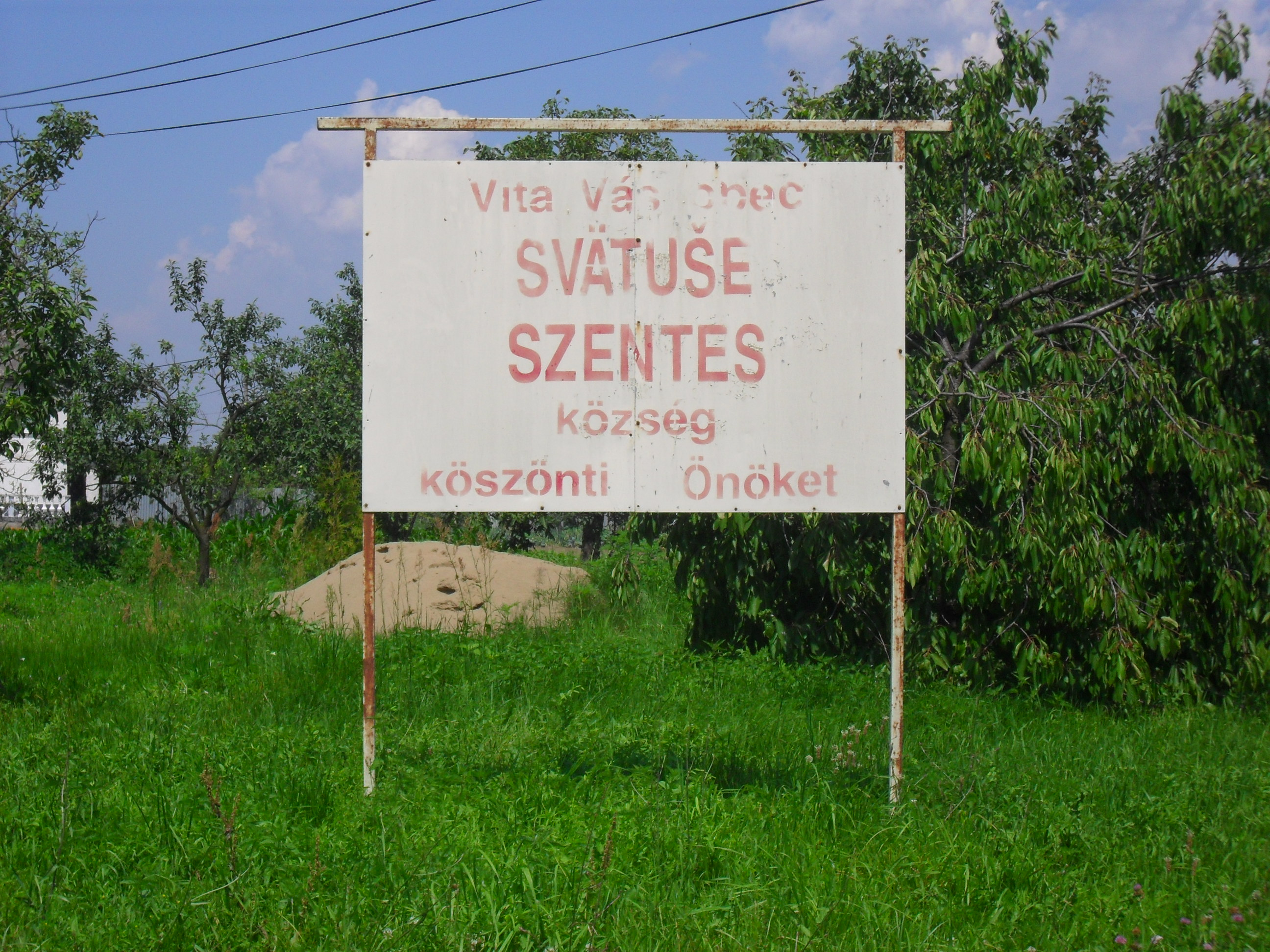 Bodrogszentes - üdvözlőtábla